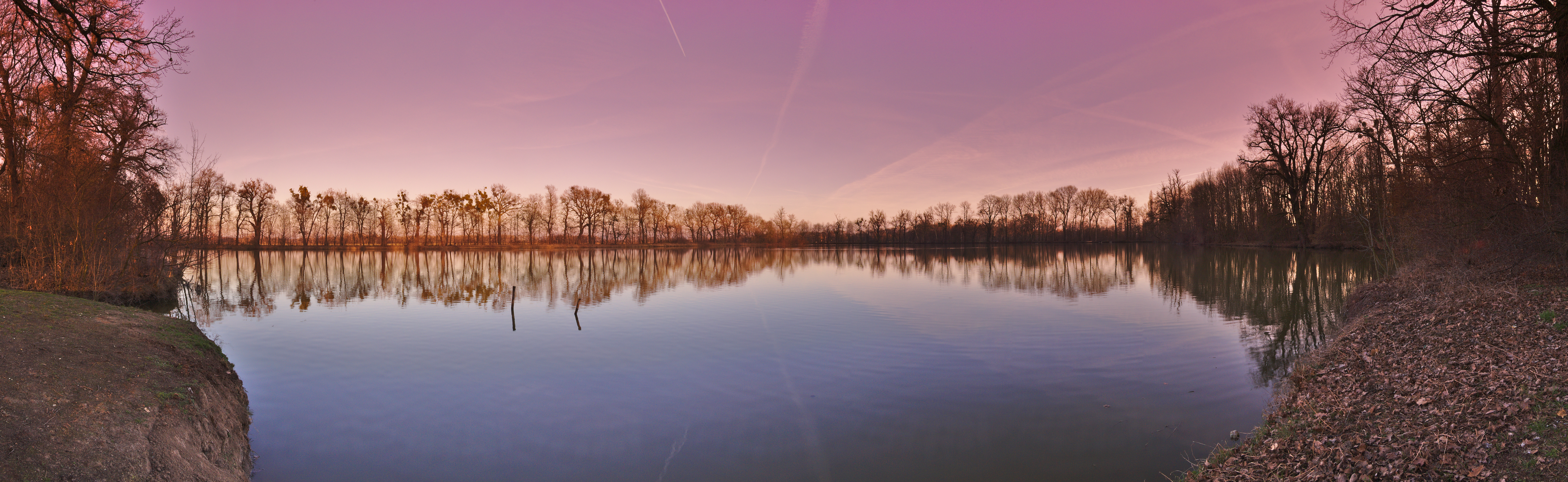 Panoramatický pohled na rybník Kolečko, Tovačov, okres Přerov